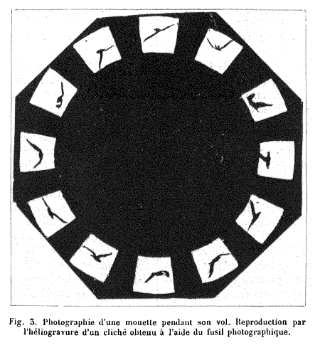 Le Fusil photographique, article d'Étienne-Jules Marey paru dans la Nature n°464 du 22 avril 1882